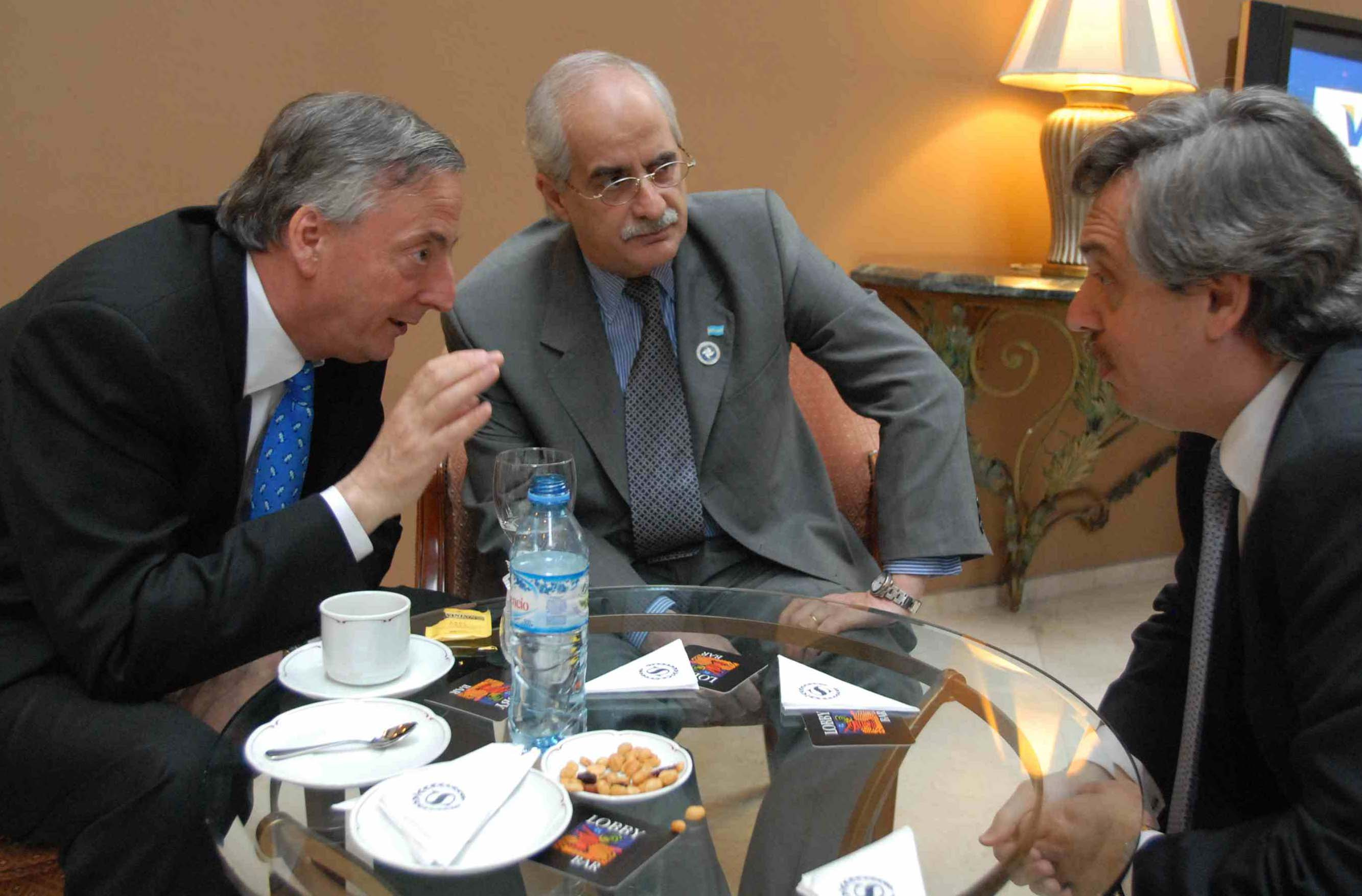 Chile - El presidente Néstor Kirchner junto al canciller Jorge Taiana y al jefe de Gabinete, Alberto Fernández.